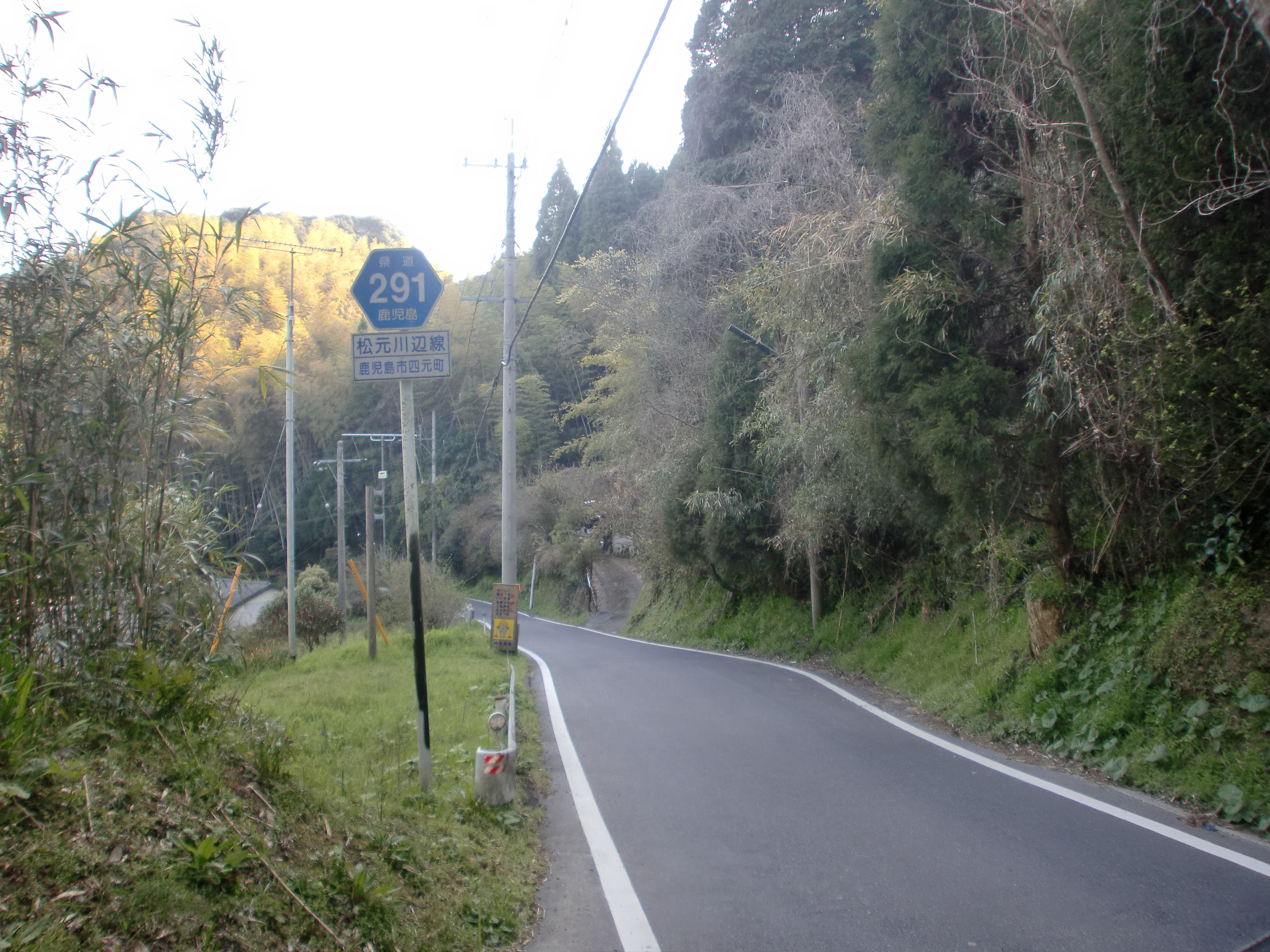 鹿児島県道291号松元川辺線を鹿児島市四元町から南九州市方面を望む。